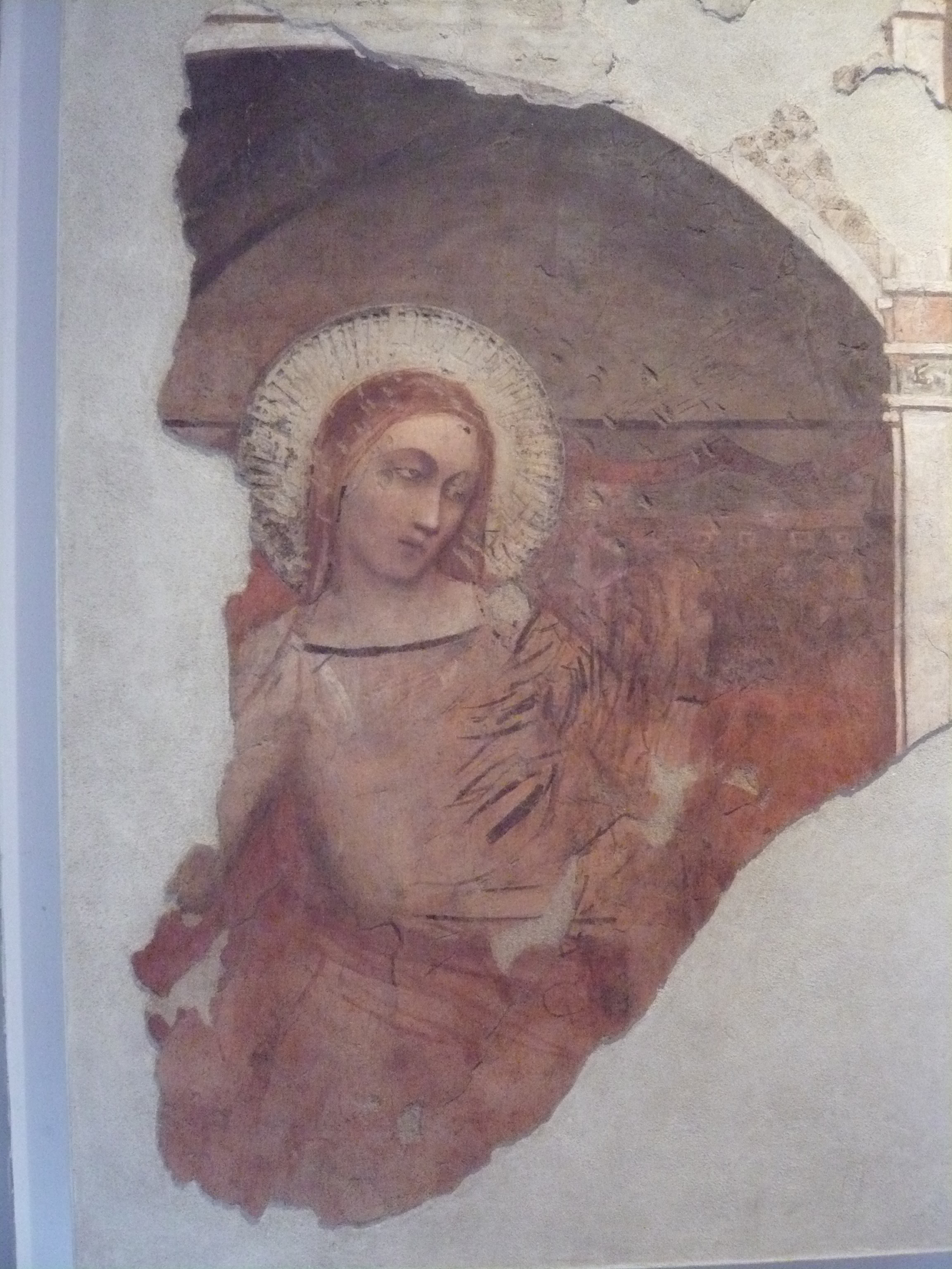 Annunciata